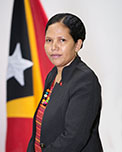 Irene Gonzaga Sarmento, Abgeordnete des Nationalparlaments Osttimors